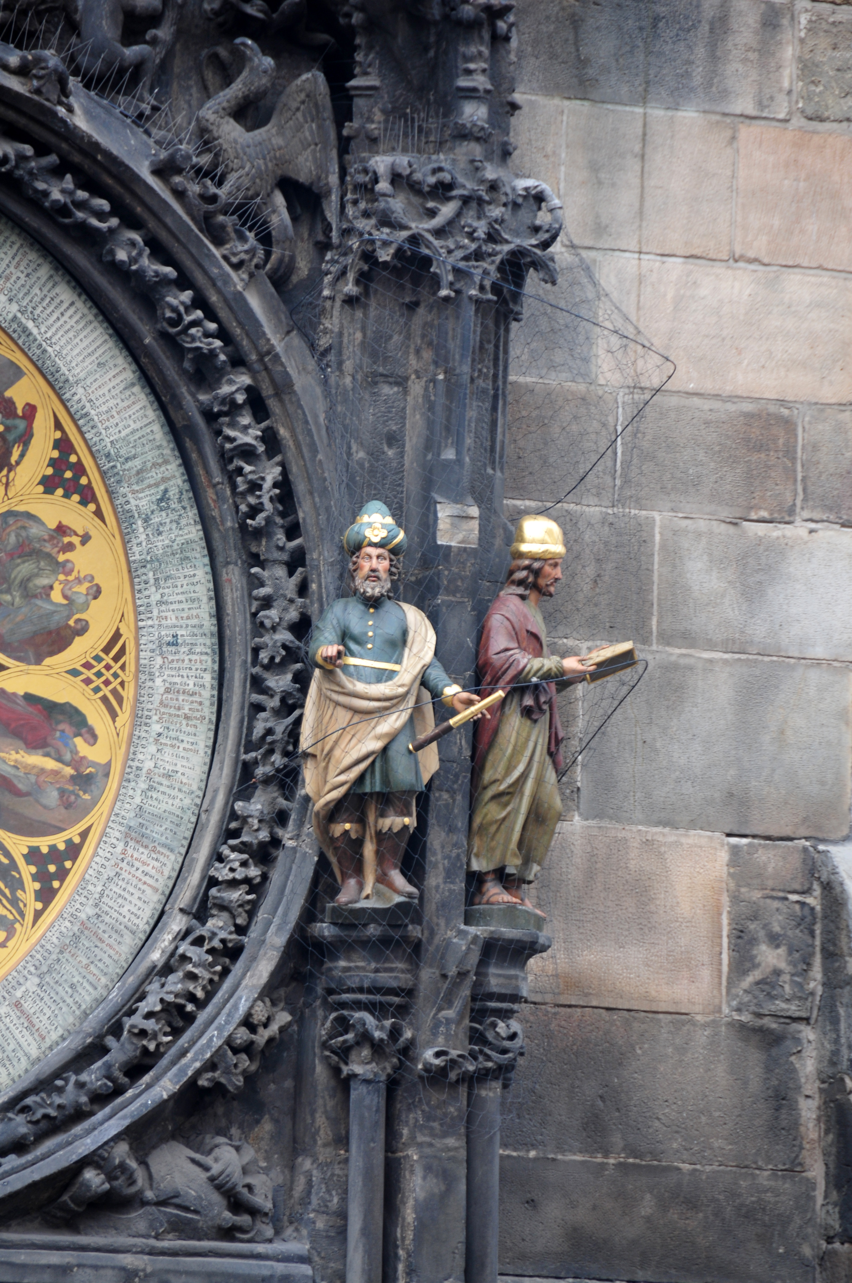 Prag